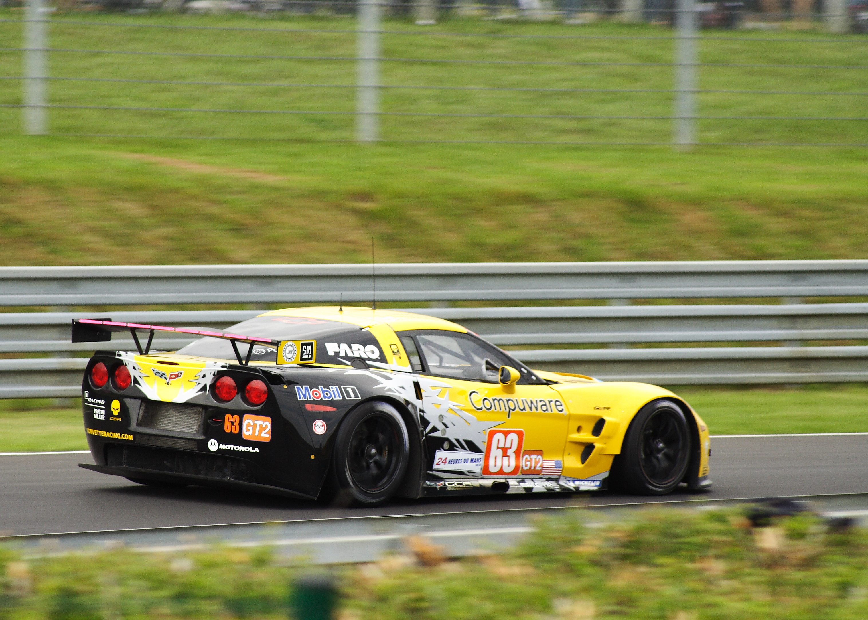 Le Mans 24 Hour Race 2010